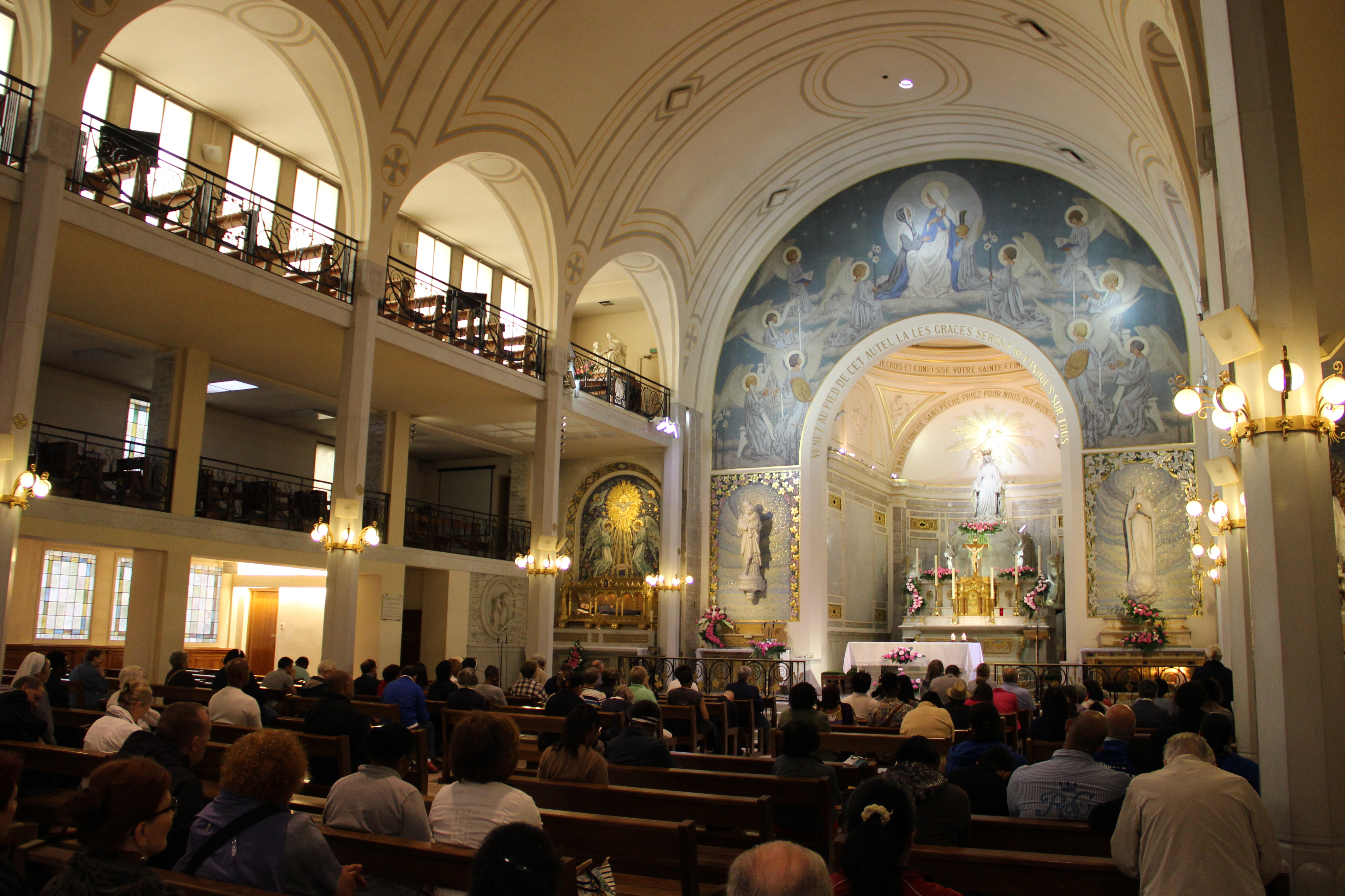 Vue intérieure